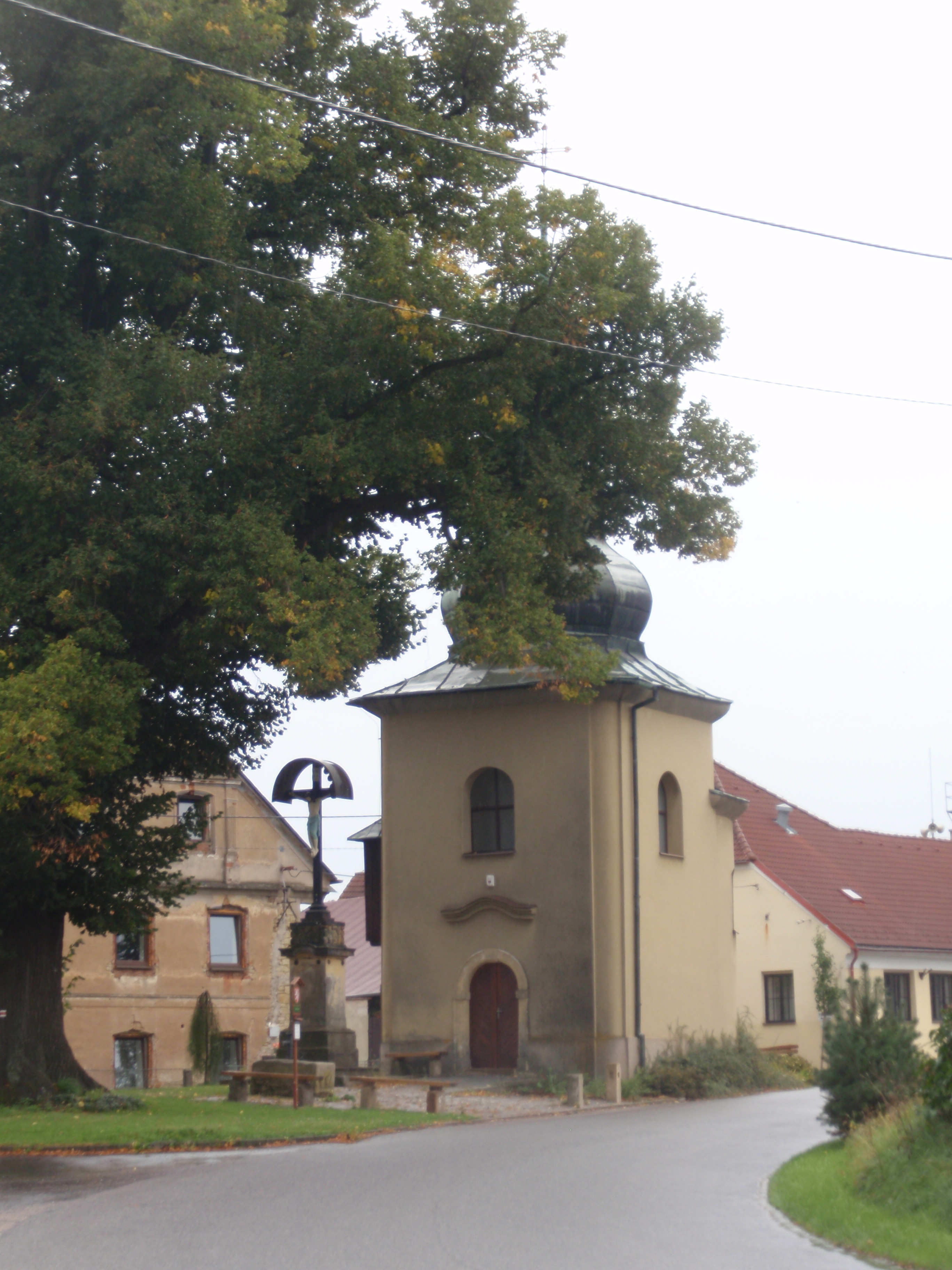 Kaple P. Marie (Strakov), Strakov